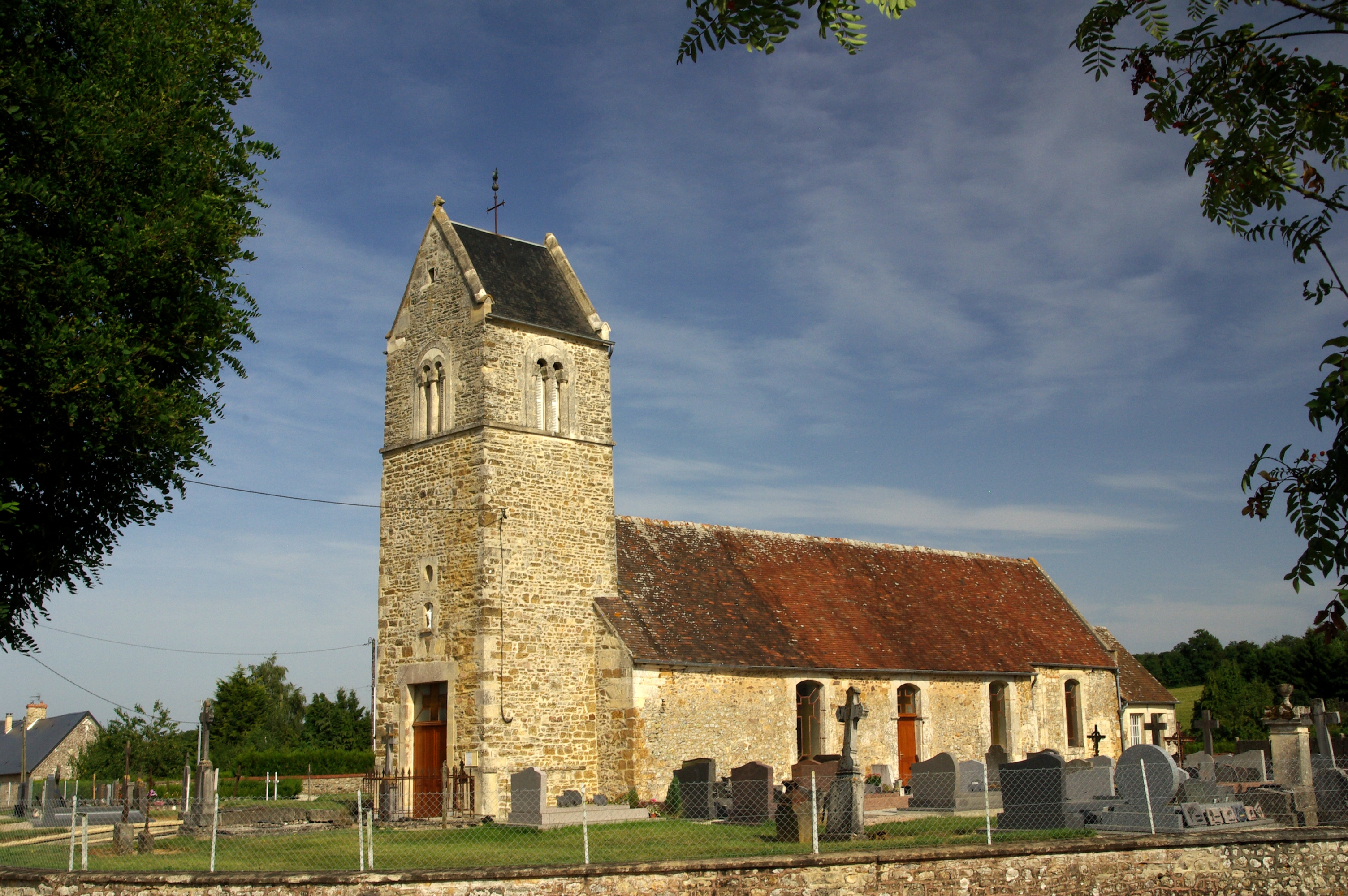 L'église de Bonnoeil, Calvados.